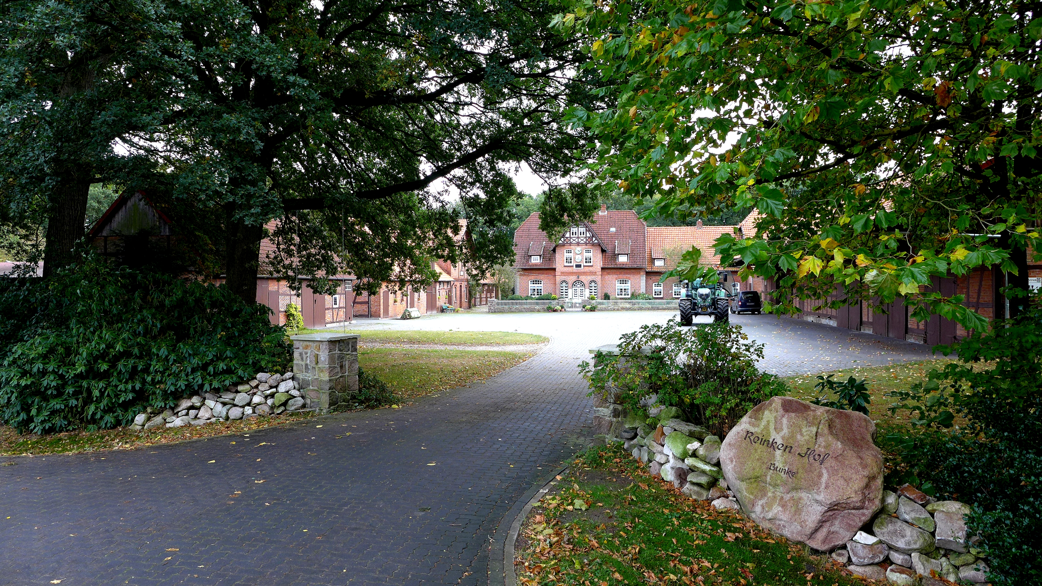 Architektonisch herausragende Hofanlage "Reinken Hof" in Odeweg, einem Ortsteil von Kirchlinteln im Landkreis Verden. Aufnahmedatum 2016-10.